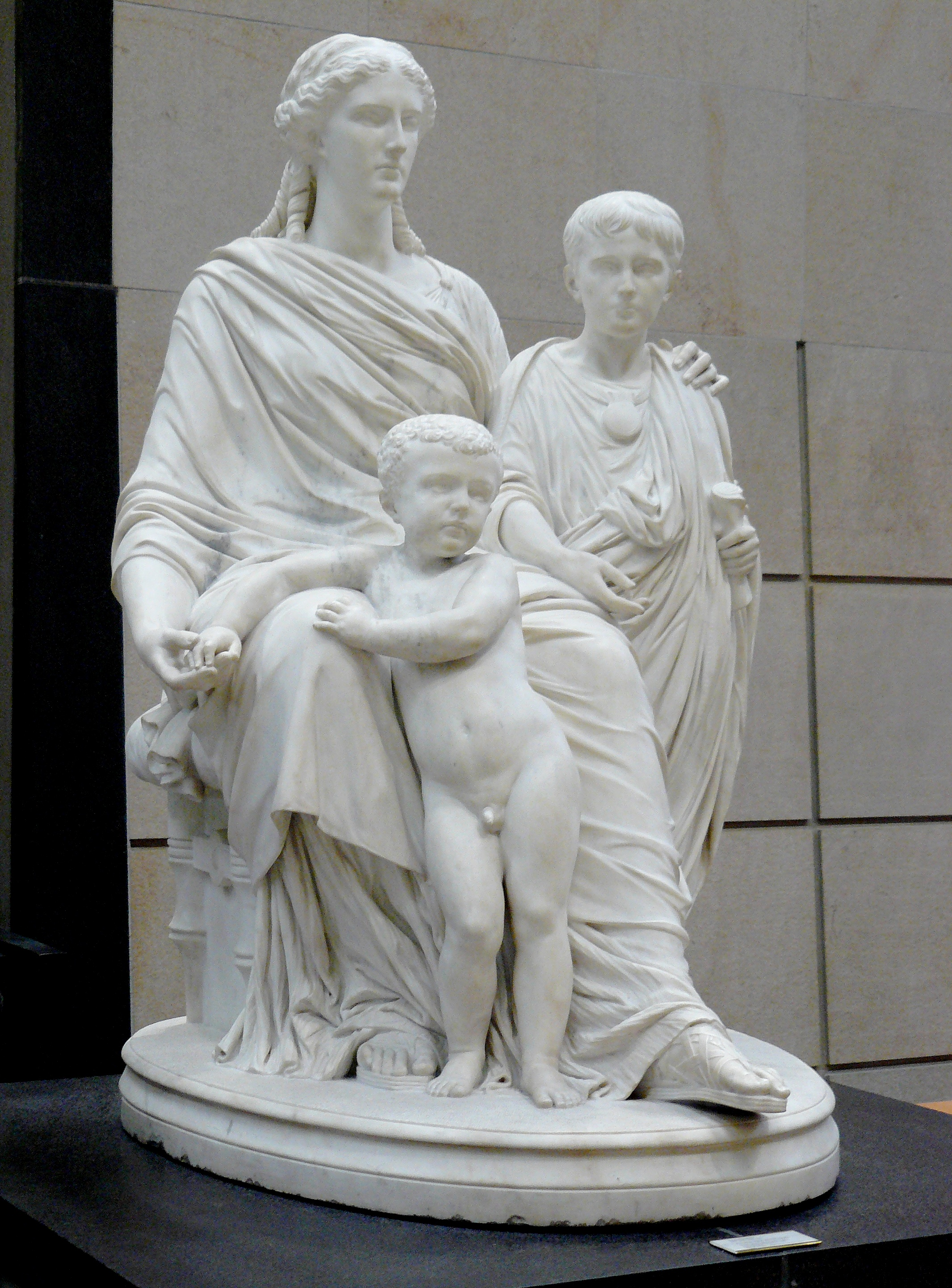 Jules Cavelier (1814-1894) - Marbre, groupe Cornélie (Cornelia Africana), mère des Gracques, hauteur : environ 1,60 m - d'après le plâtre exposé à l'exposition universelle de 1855, salon de 1861, acquis en 1861, dépôt du Musée du Louvre - n° Inv RF 164